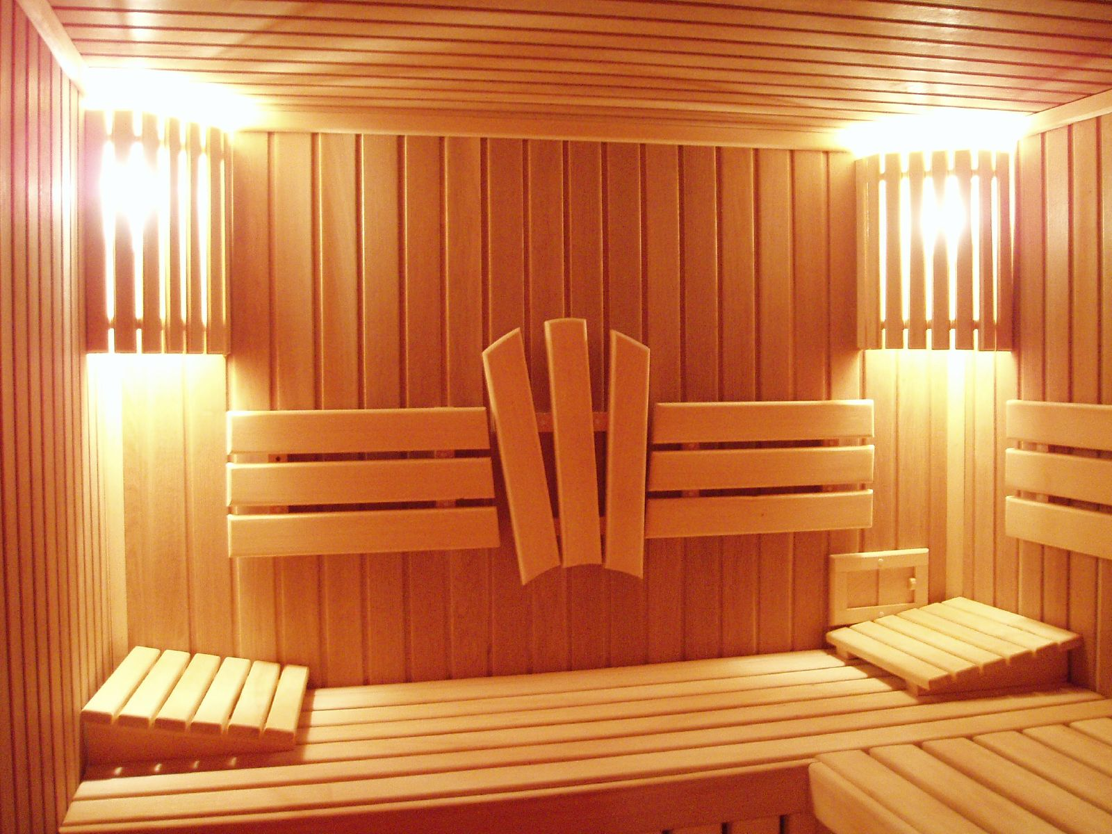 Парилка